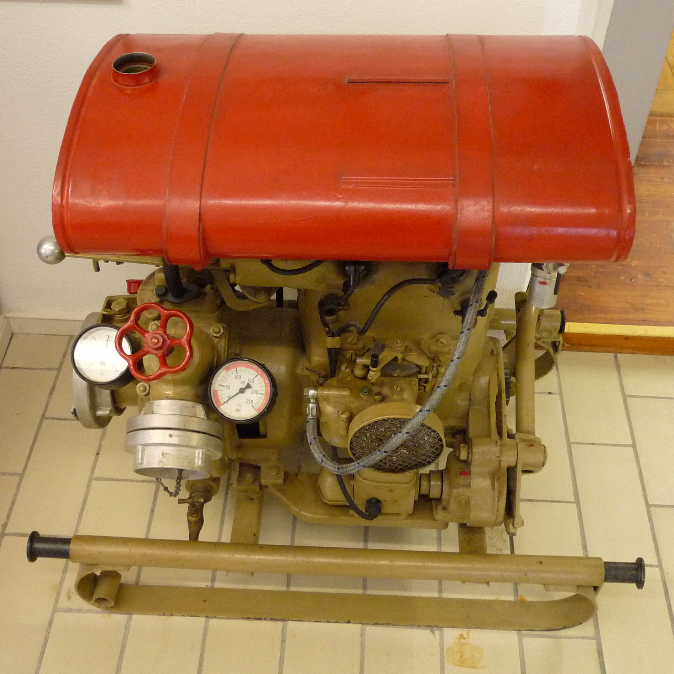 1938 von Magirus in Ulm gefertigte Tragkraftspritze TS8-8 (Einheitsspritze) im Feuerwehrmuseum in Salem. Angetrieben wurde sie von einem 2-Takt Motor (DKW-Auto-Union) mit 1103 cm3 Hubraum und 29 PS. Sie hatte eine Fördermenge von 3000 Liter pro Minute